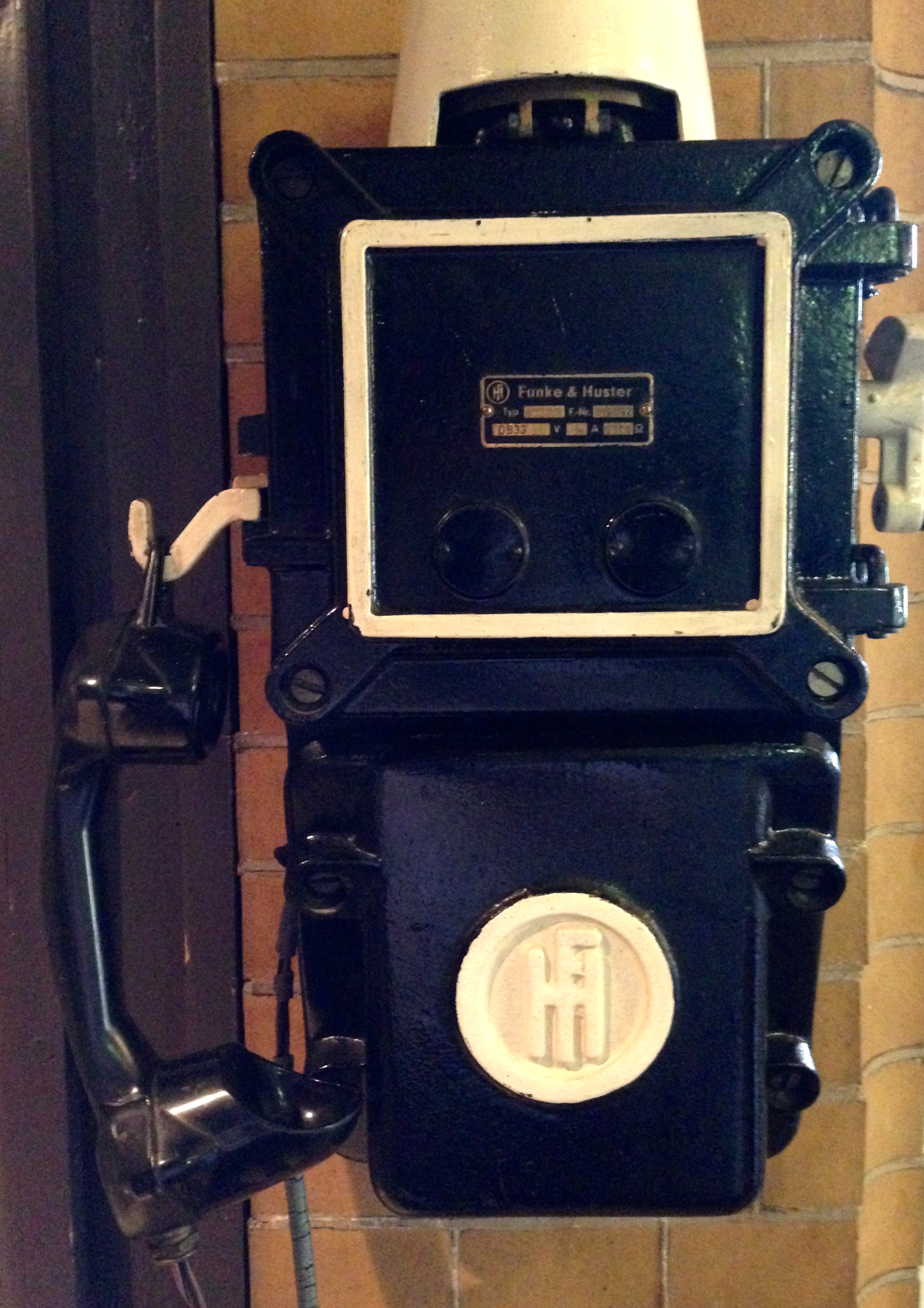 Oude slingertelefoon van Funke & Huster (een nog steeds bestaand Duits bedrijf dat in 'Signal uni Kommunikationsgeräte' handelt) die zich nog binnen in het stationsgebouw bevindt.